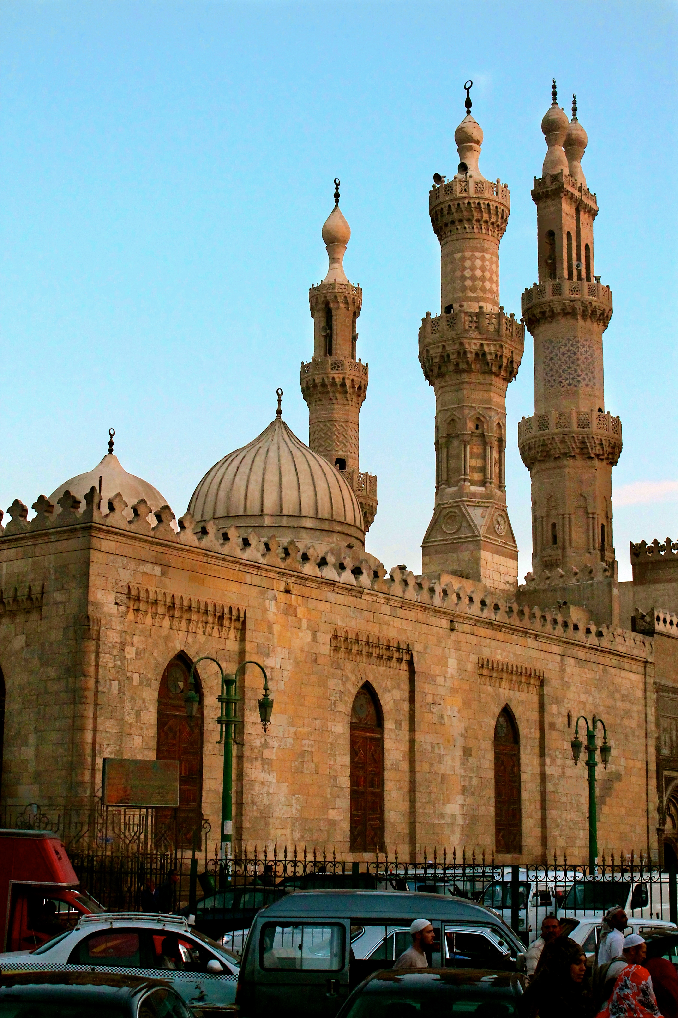 Mešita Al Azhar v Káhiře, Egypt